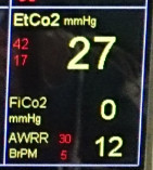 اطلاعات کاپنوگراف بر روی مانتور